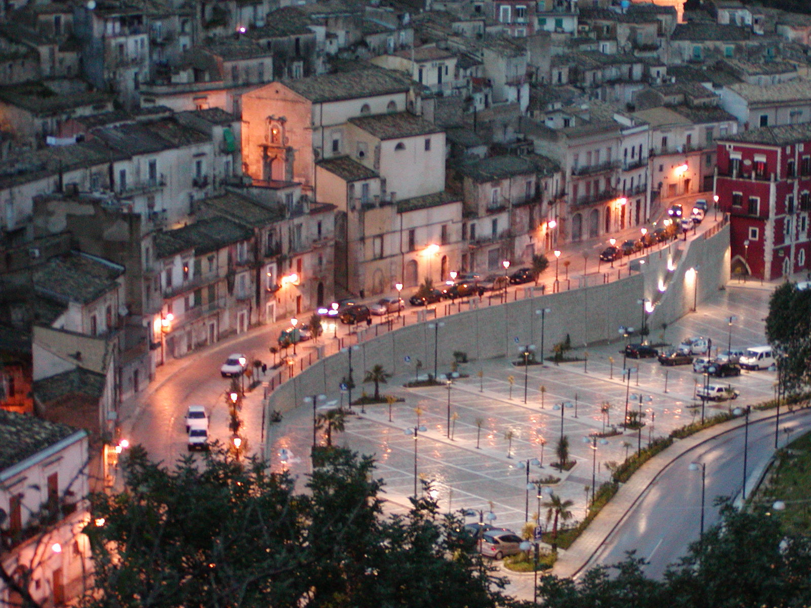 Panorama Ibleo